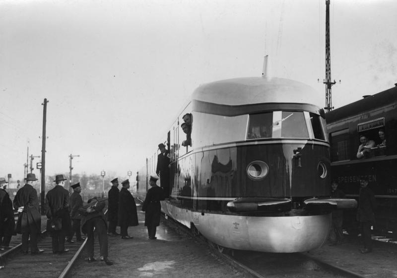 Deutschlands erster "Fliegender Schotte" in Berlin. die erste deutsche Schnell-Triebwagen der Reichsbahn, wurde auf der Strecke Berlin-Hamburg in den Verkehr gestellt. Der Schnell-Triebwagen erreichte eine Stundengeschwindigkeit von 155 Km. Der Schnell-Triebwagen vor seiner ersten Probefahrt nach Hamburg auf dem Lehrter Bahnhof in Berlin.